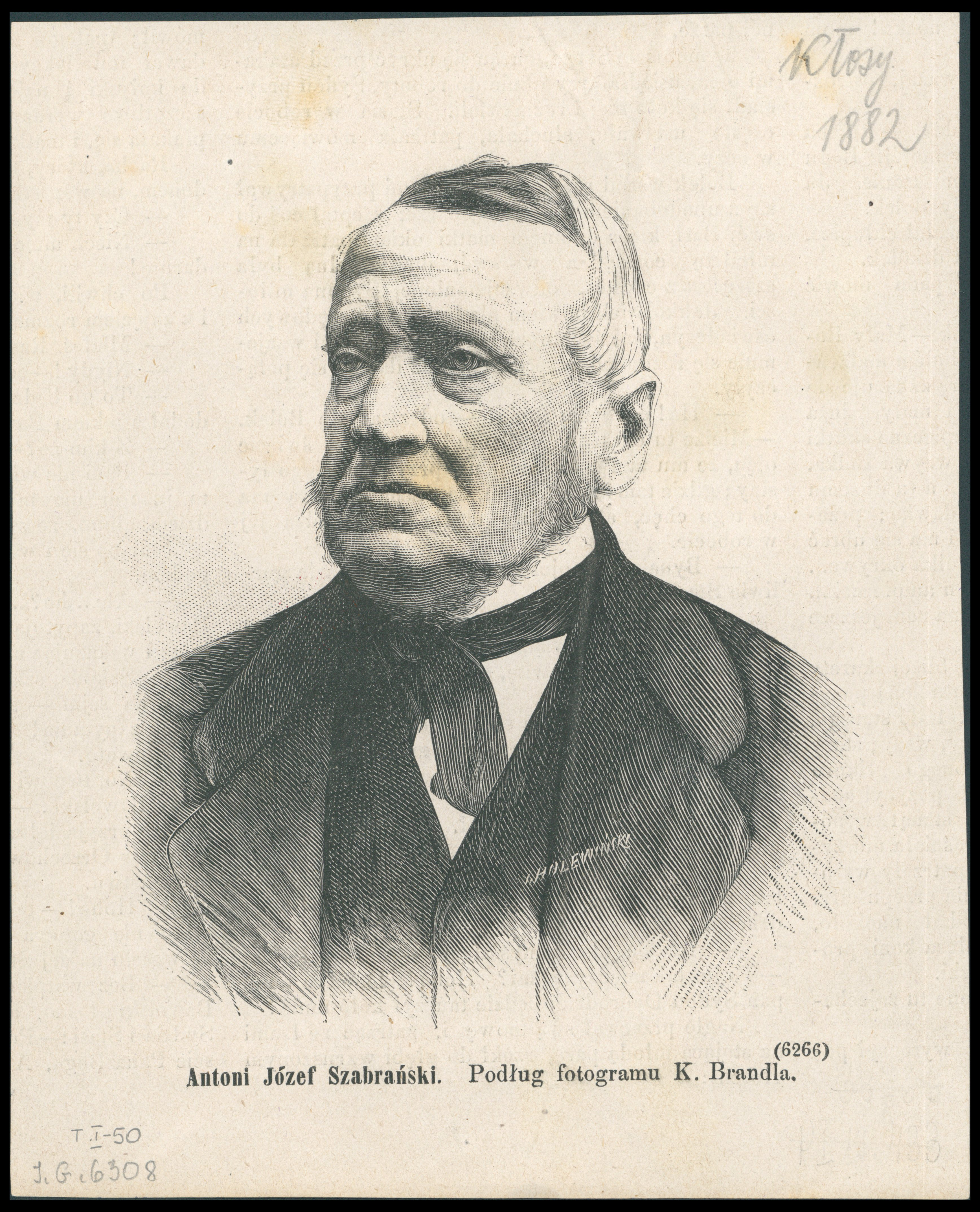 Antoni Józef Szabrański